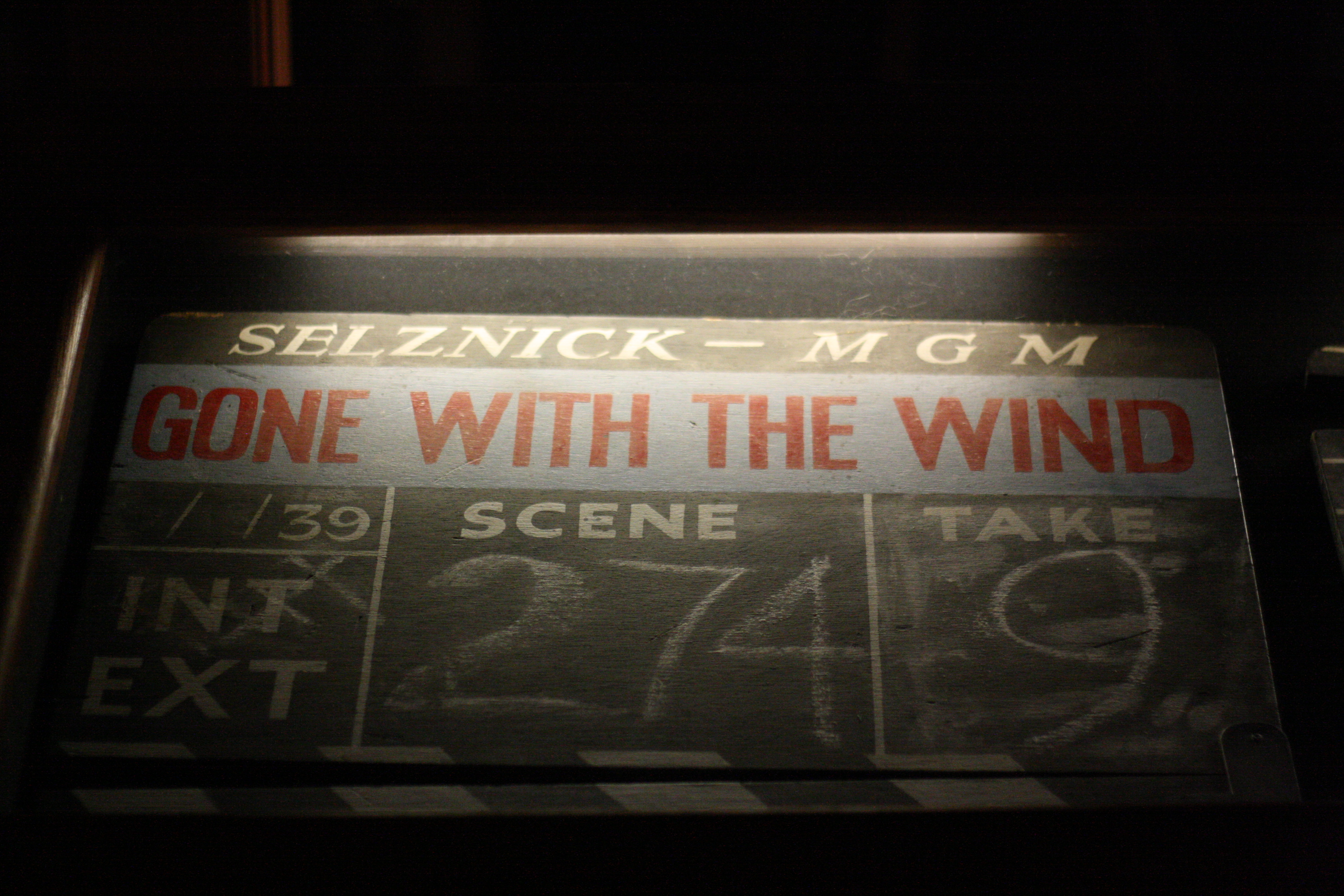 Tem também algumas relíquias cinematográficas, como a claquete usada em "O Vento Levou"